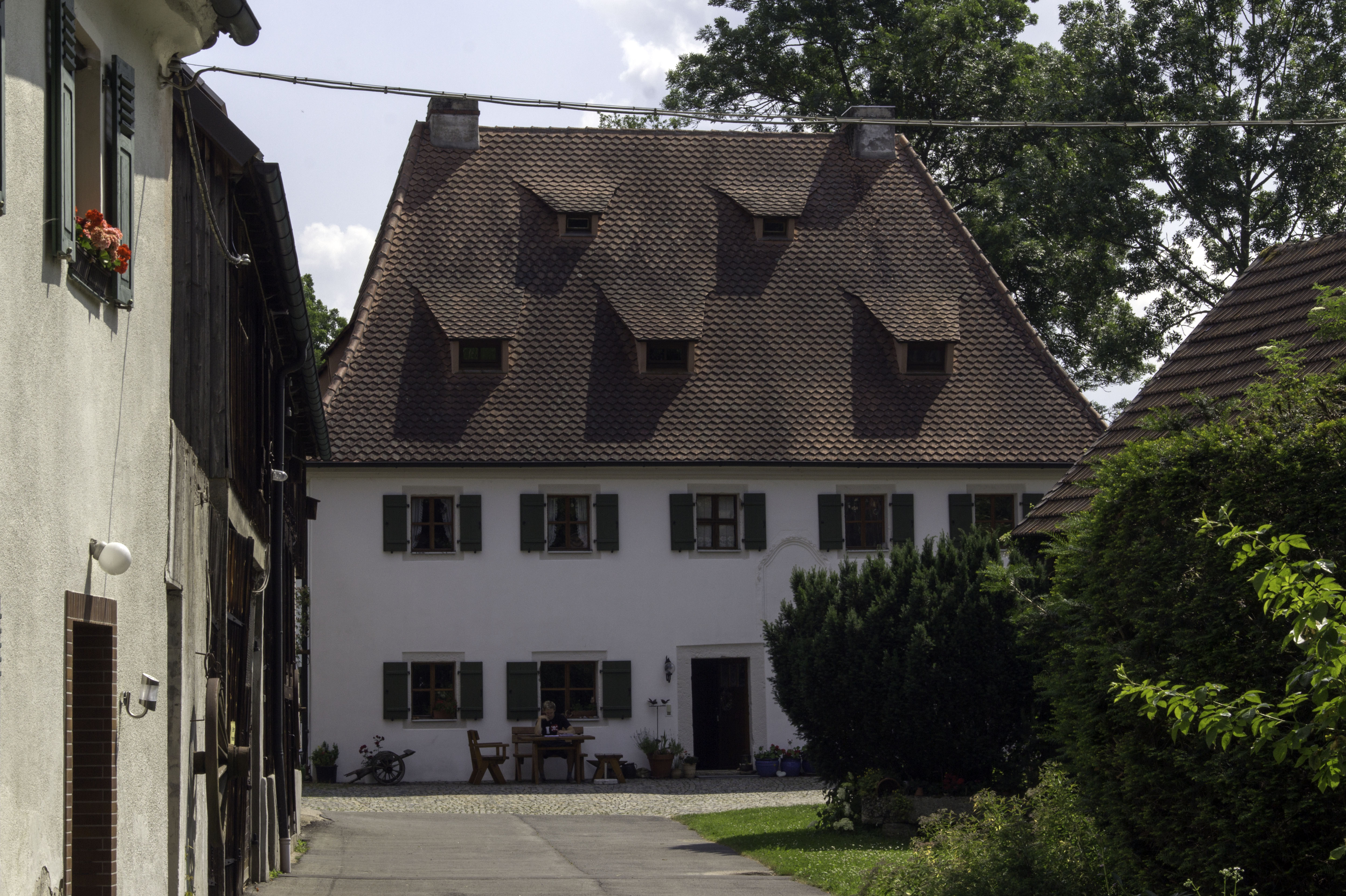 Staubershammer